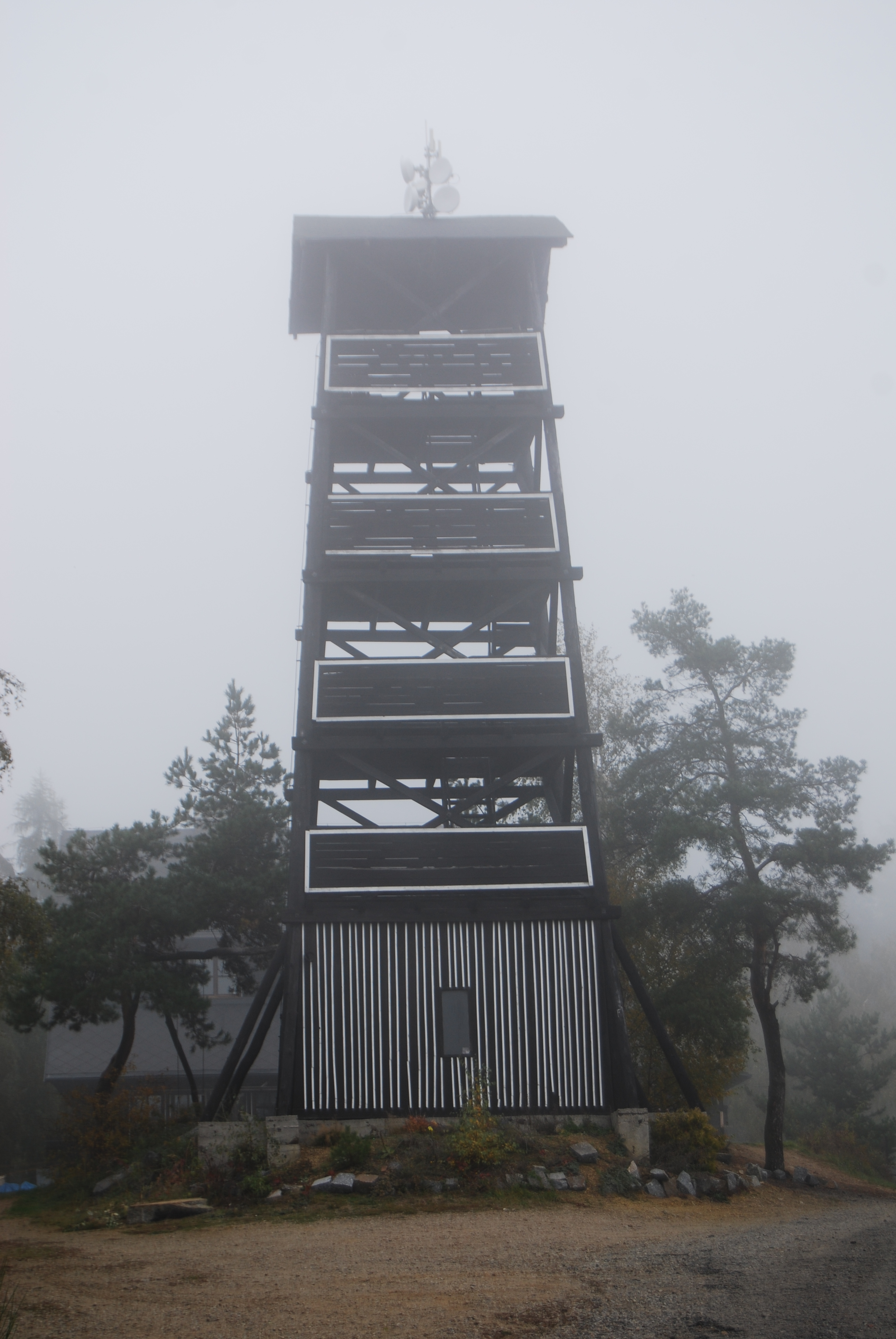 Langova rozhledna. Onen Svět (Kovářov). Okres Písek. Česká republika.